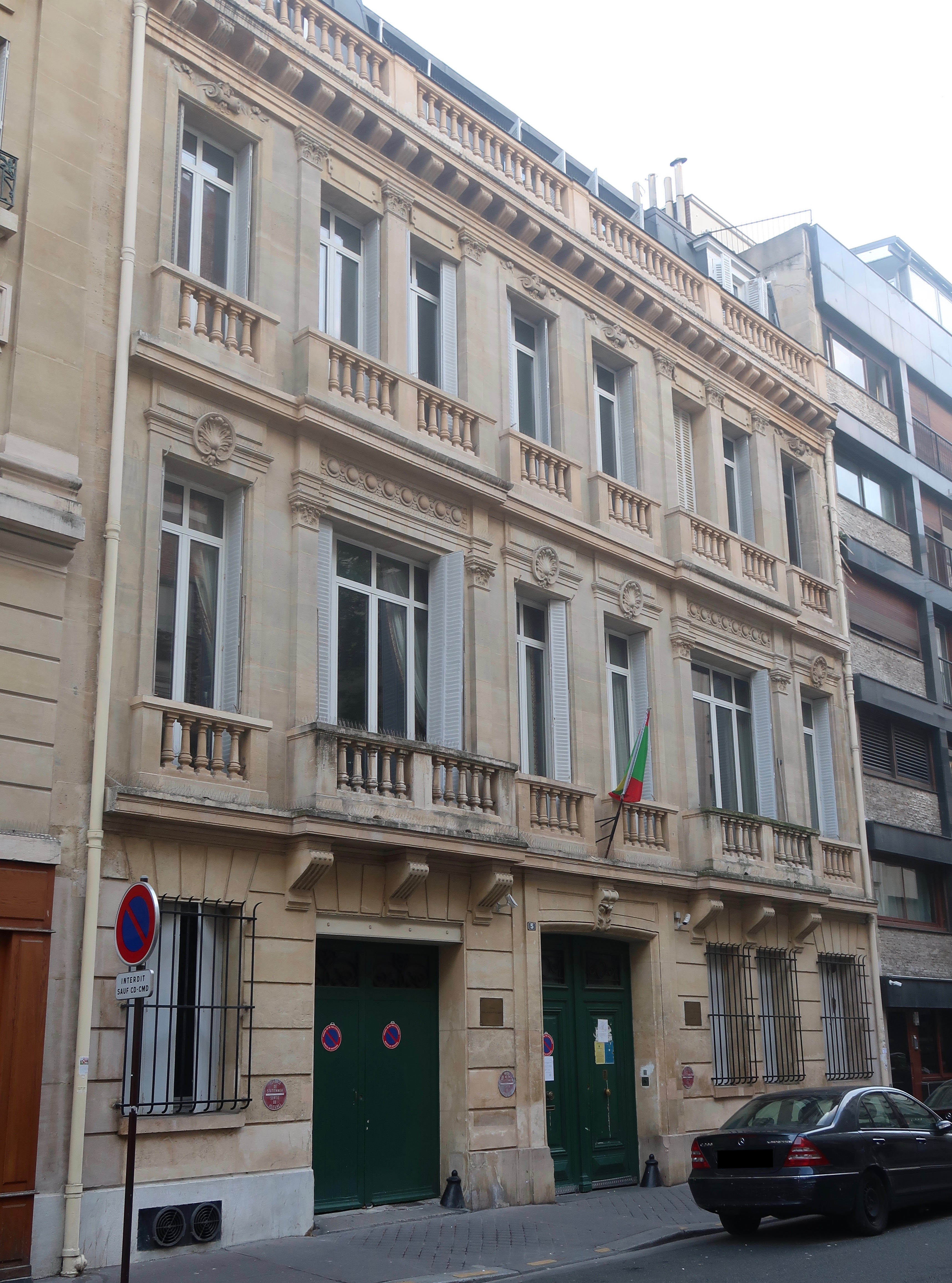 Ambassade de Mauritanie en France, 5 rue de Montevideo (Paris, 16e).